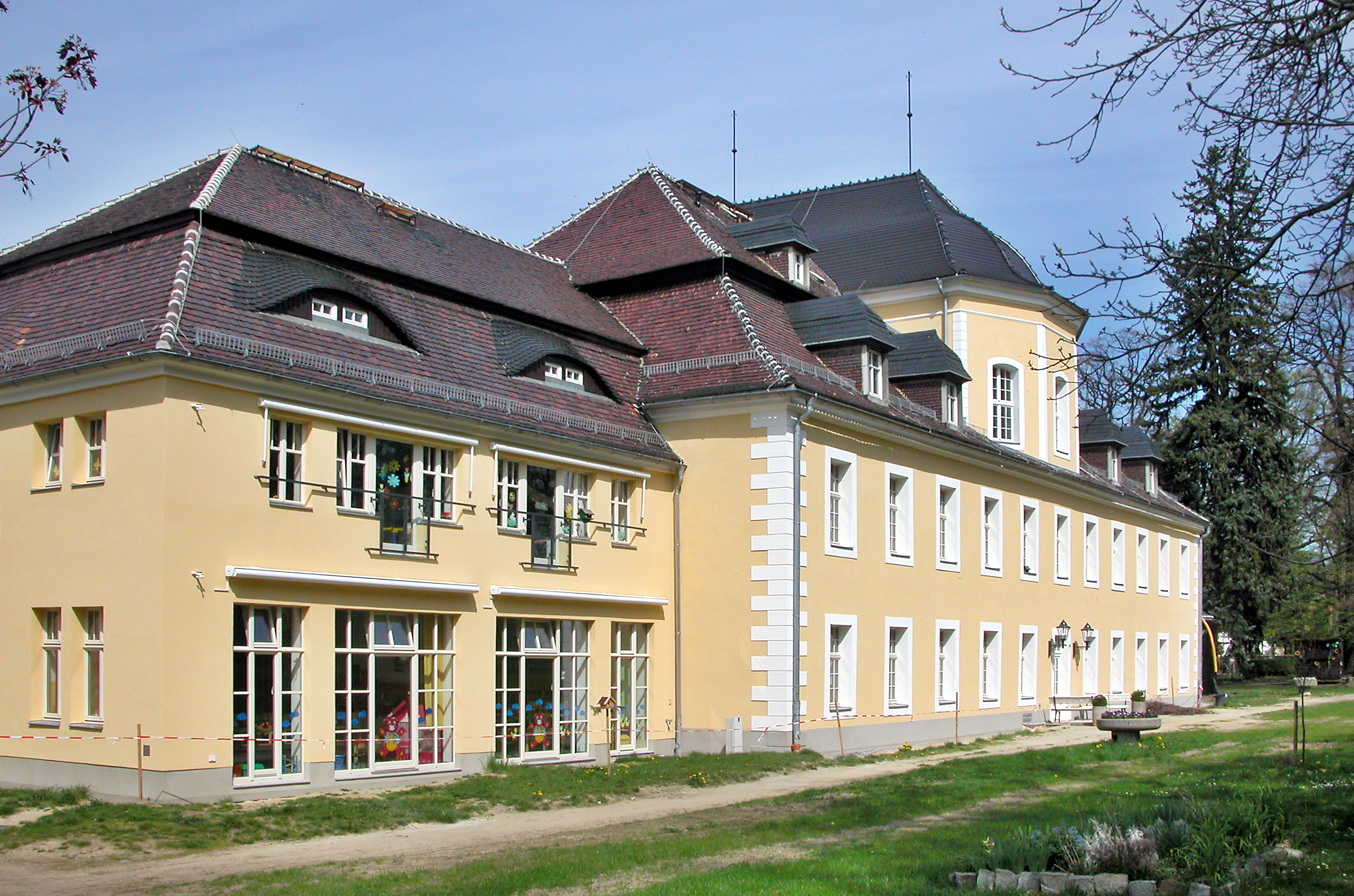 28.04.2008 02708 Kittlitz (Löbau), Ringstraße 1 (GMP: 51.131944,14.672880): Schloß Kittlitz, vermtl. in der 1. Hälfte des 18 Jh. erbaut. Seit DDR-Zeiten wird das Schloß als Kindergarten, Kinderkrippe, Standesamt, Gemeindeschwesternstation und für Wohnungen genutzt. Der Heimat- und Schloßverein Kittlitz, dessen Mitglieder die Sanierung des Hauses selbst mit betrieben haben, nutzt eine Teilfläche als "Haus der Vereine" für Kulturveranstaltungen. Parkseite. [DSCN32560.TIF]20080428610DR.JPG(c)Blobelt